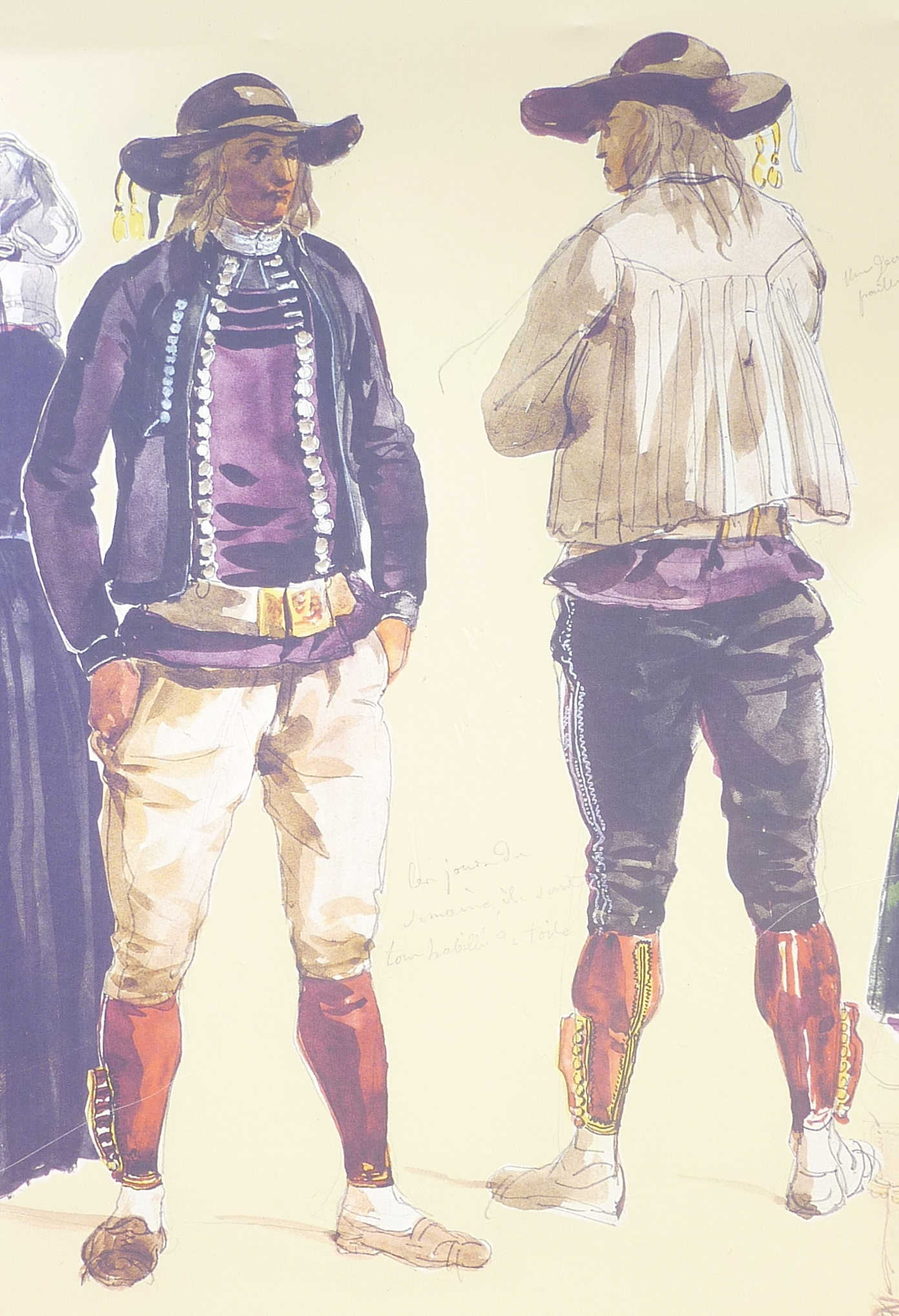 François Hippolyte Lalaisse : Homme du Faouët (Galerie armoricaine, 1848)